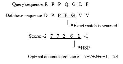 BLAST中製作字組表的方法